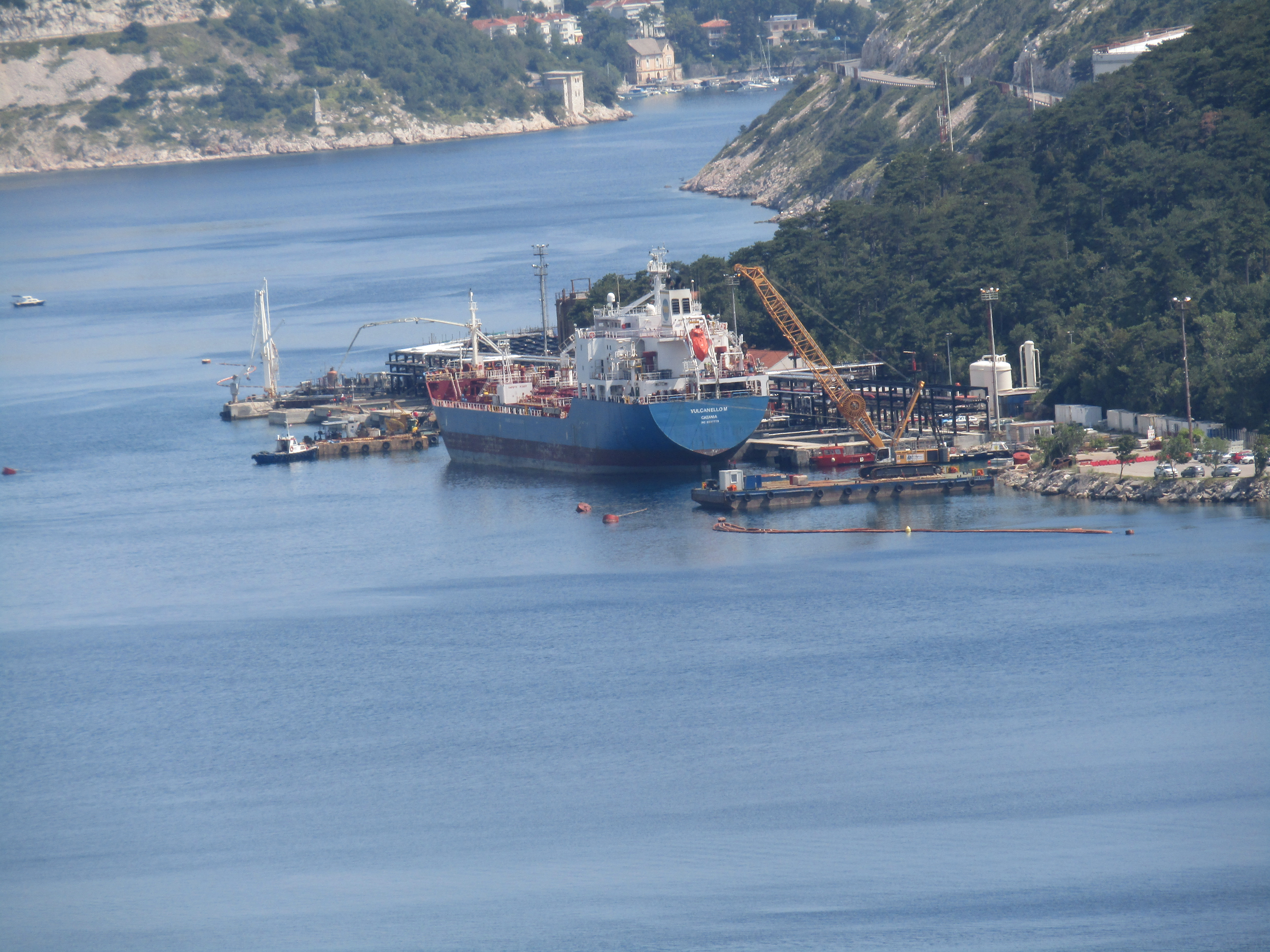 VULCANELLO M (IMO 9337779) (Baujahr 2006) in der Werft 3. Maj in der Stadt Rijeka (Kroatien)